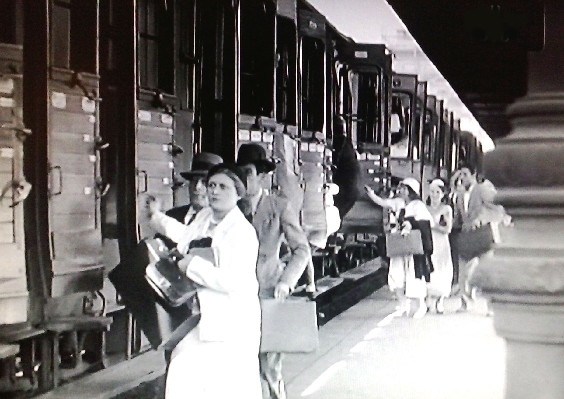 Scena iniziale di "Treno popolare" (R.Matarazzo, 1933): la calca alla partenza del treno.